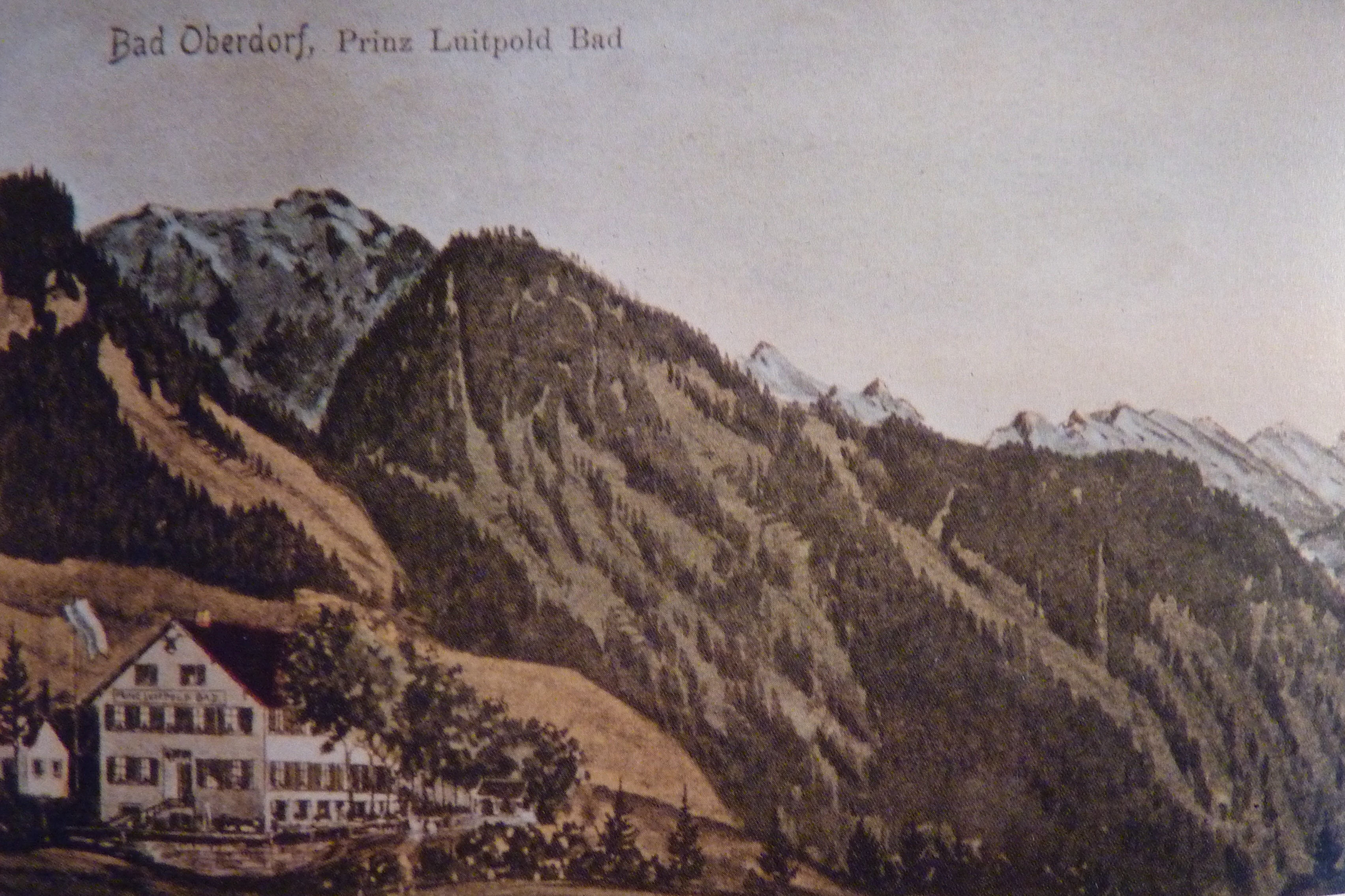 Prinz-Luitpold-Bad in den 1890ern